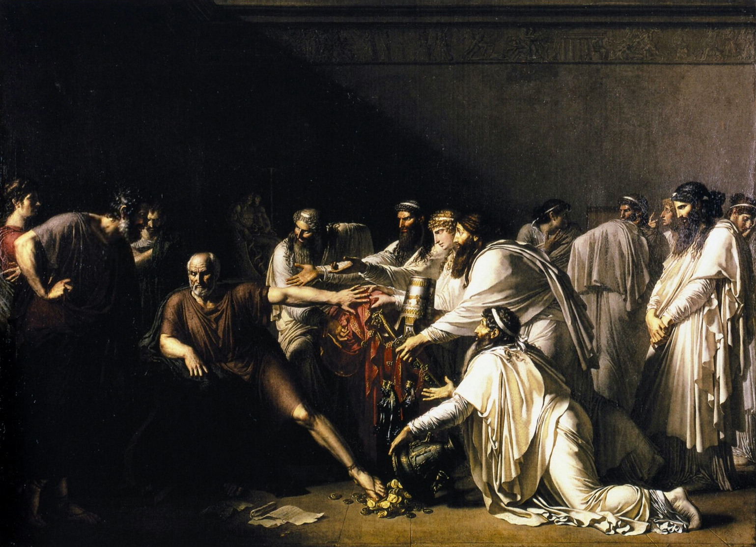 Hippocrate refusant les présents d'ArtaxerxèsHippocrates refusing the gifts of Artaxerxestitle QS:P1476,fr:"Hippocrate refusant les présents d'Artaxerxès" label QS:Lfr,"Hippocrate refusant les présents d'Artaxerxès" label QS:Len,"Hippocrates refusing the gifts of Artaxerxes"